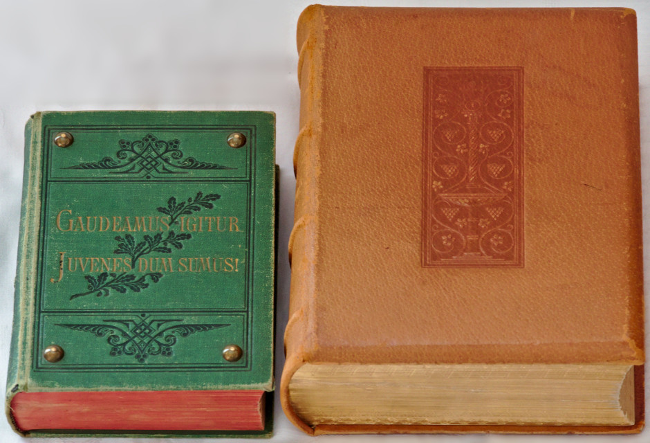 Zum Jubiläum der 100. Auflage des Allgemeinen Deutschen Kommersbuches gab der Verlag Moritz Schauenburg eine limitierte Sonderausgabe heraus (abgebildet neben einer Ausgabe H)